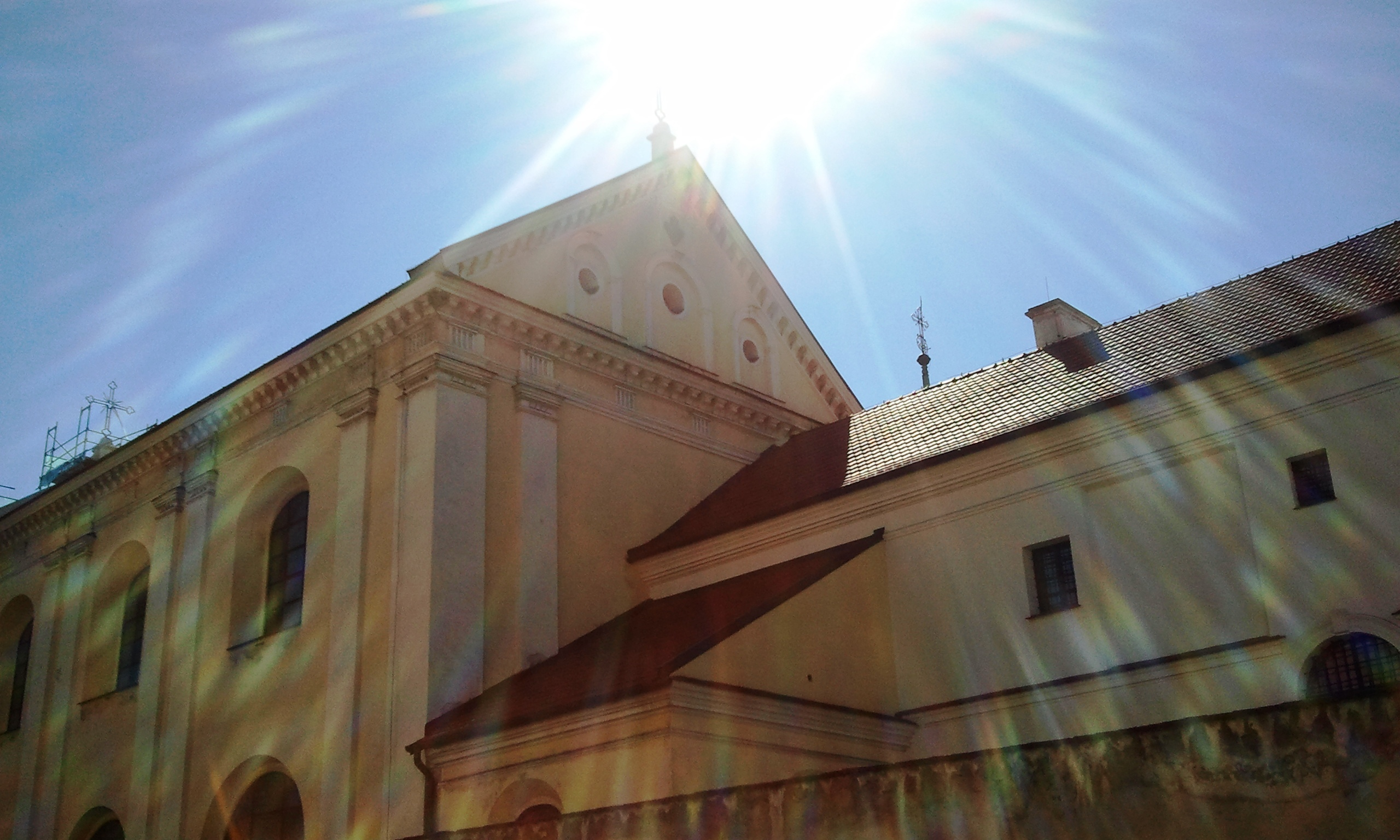 Kraków, kościół klasztorny wizytek p.w. św. Franciszka Salezego, 1692-1695, 1875-1876